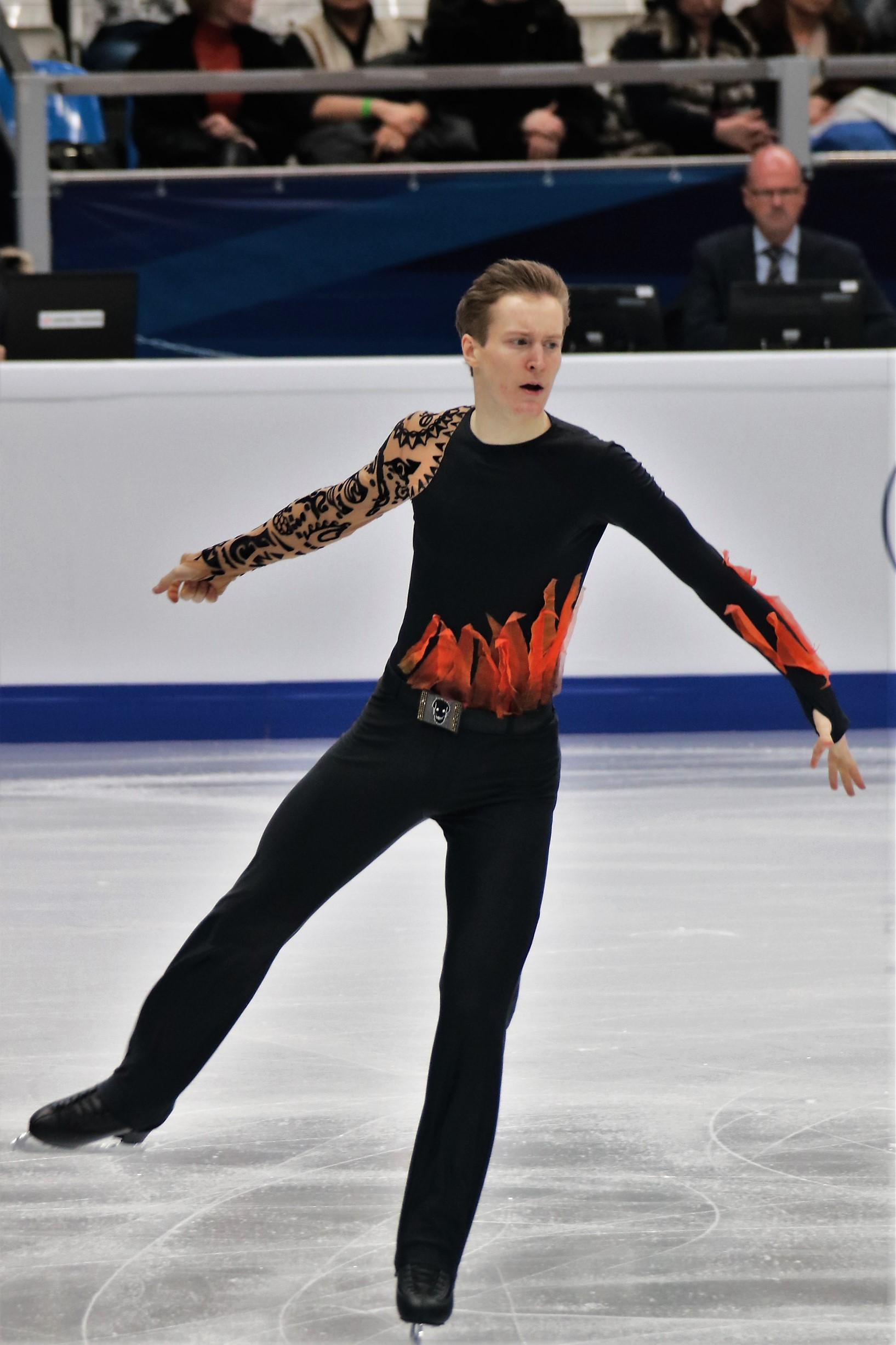 Александр Самарин (Россия) на Чемпионате Европы по фигурному катанию 2018.